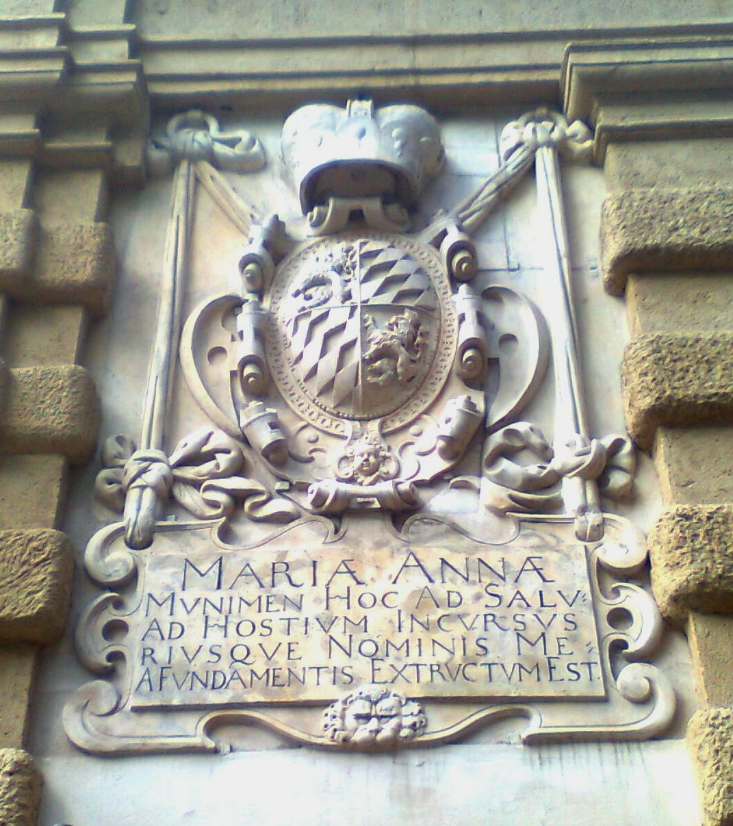 Paulustor, Graz, rechtes Wappen Maria Anna von Bayern